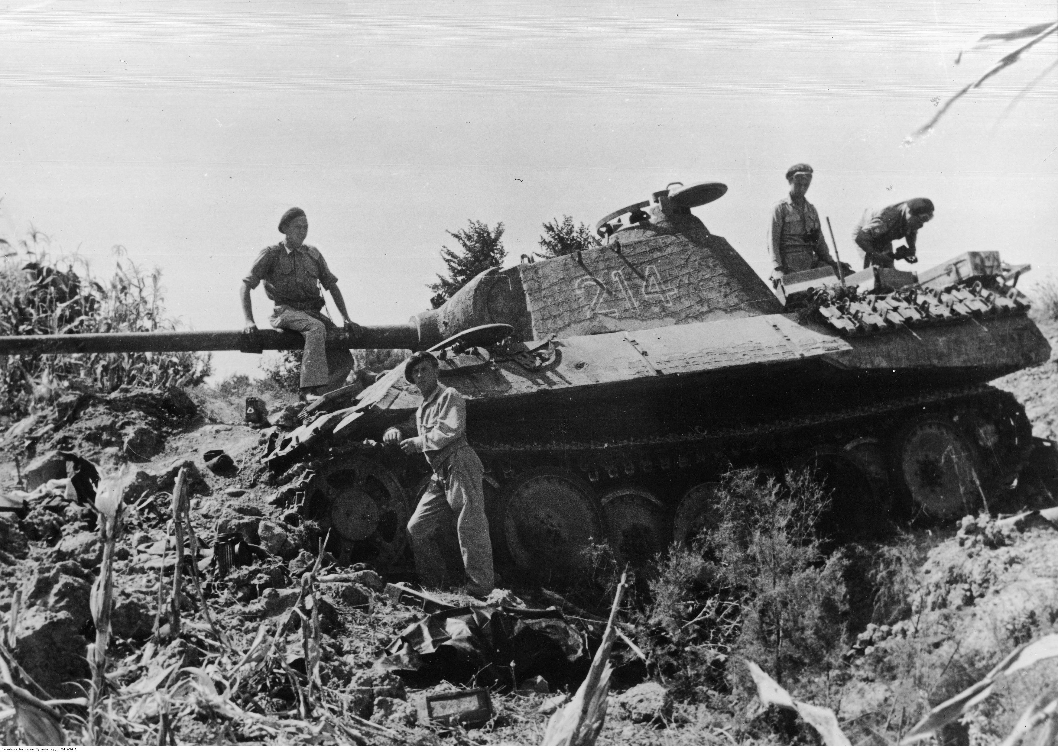 Zdobyty niemiecki sprzęt przez żołnierzy 2 Korpusu Polskiego podczas walk na Linii Gotów. Czołg PzKpfw V Sd Kfz 171 Pantera zdobyty przez żołnierzy 4 Pułku Pancernego "Skorpion" nad rzeką Metauro. Archiwum Fotograficzne Tadeusza Szumańskiego. Sygnatura: 24-494-1